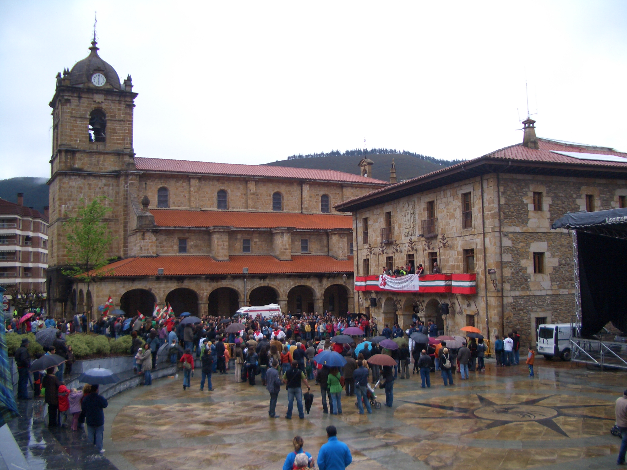 Legazpiko Euskal Herria plaza